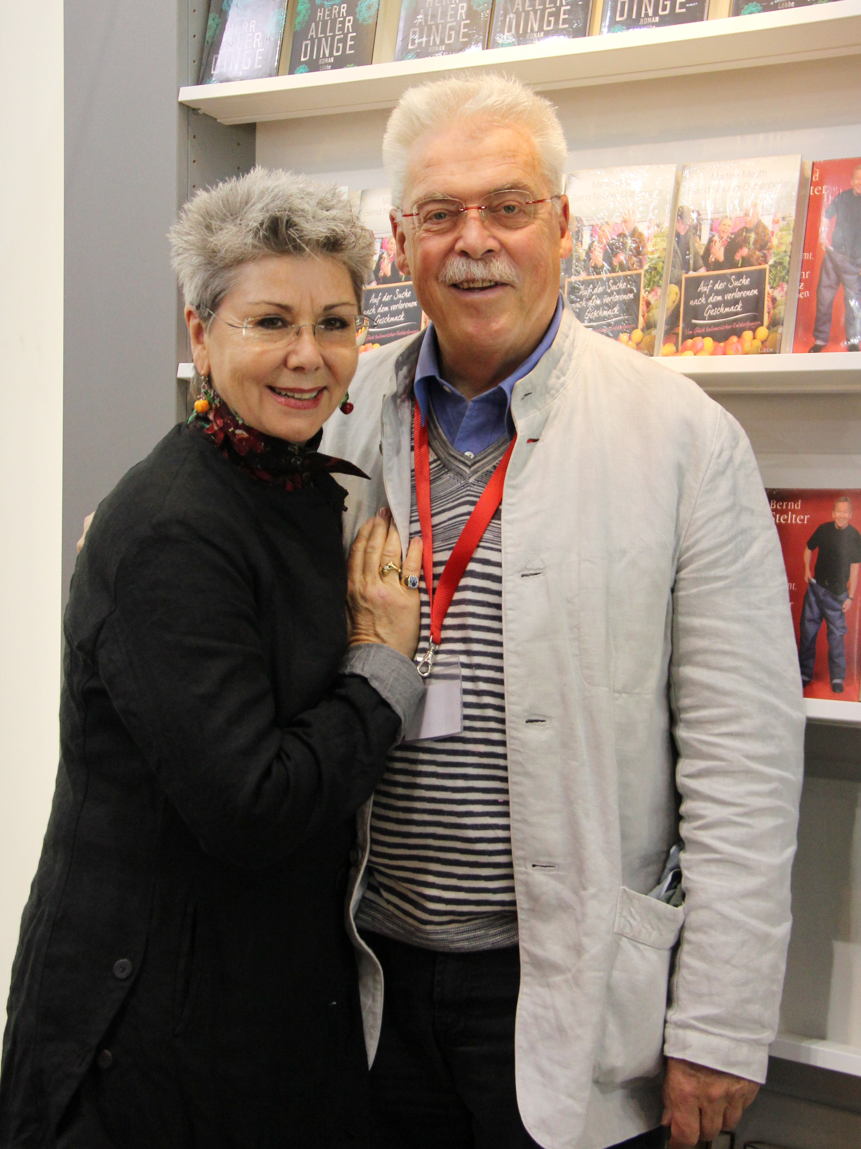 Martina Meuth und Bernd "Moritz" Neuner-Duttenhofer auf der Frankfurter Buchmesse 2011